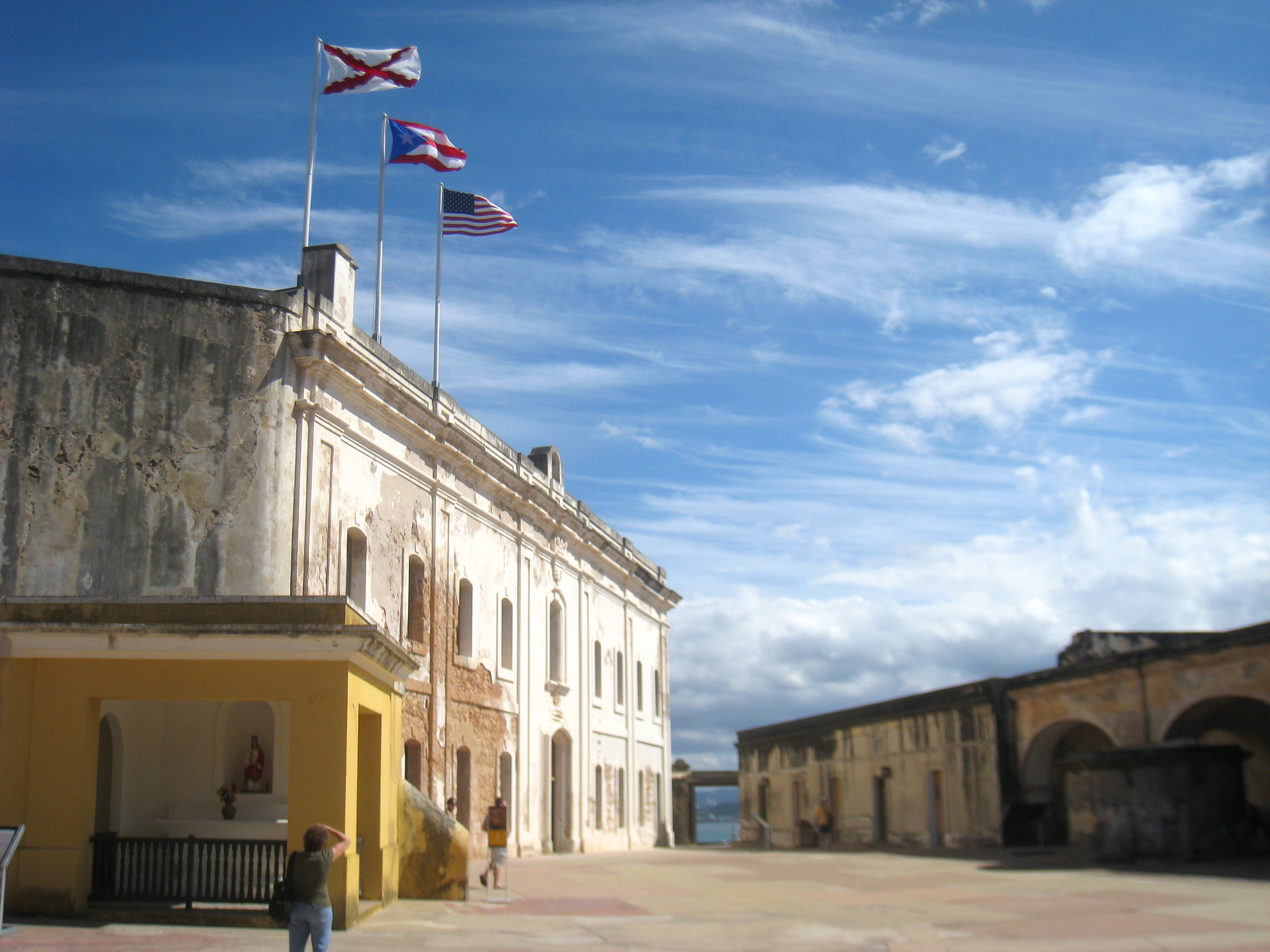 Fort San Cristóbal, San Juan, Puerto Rico.